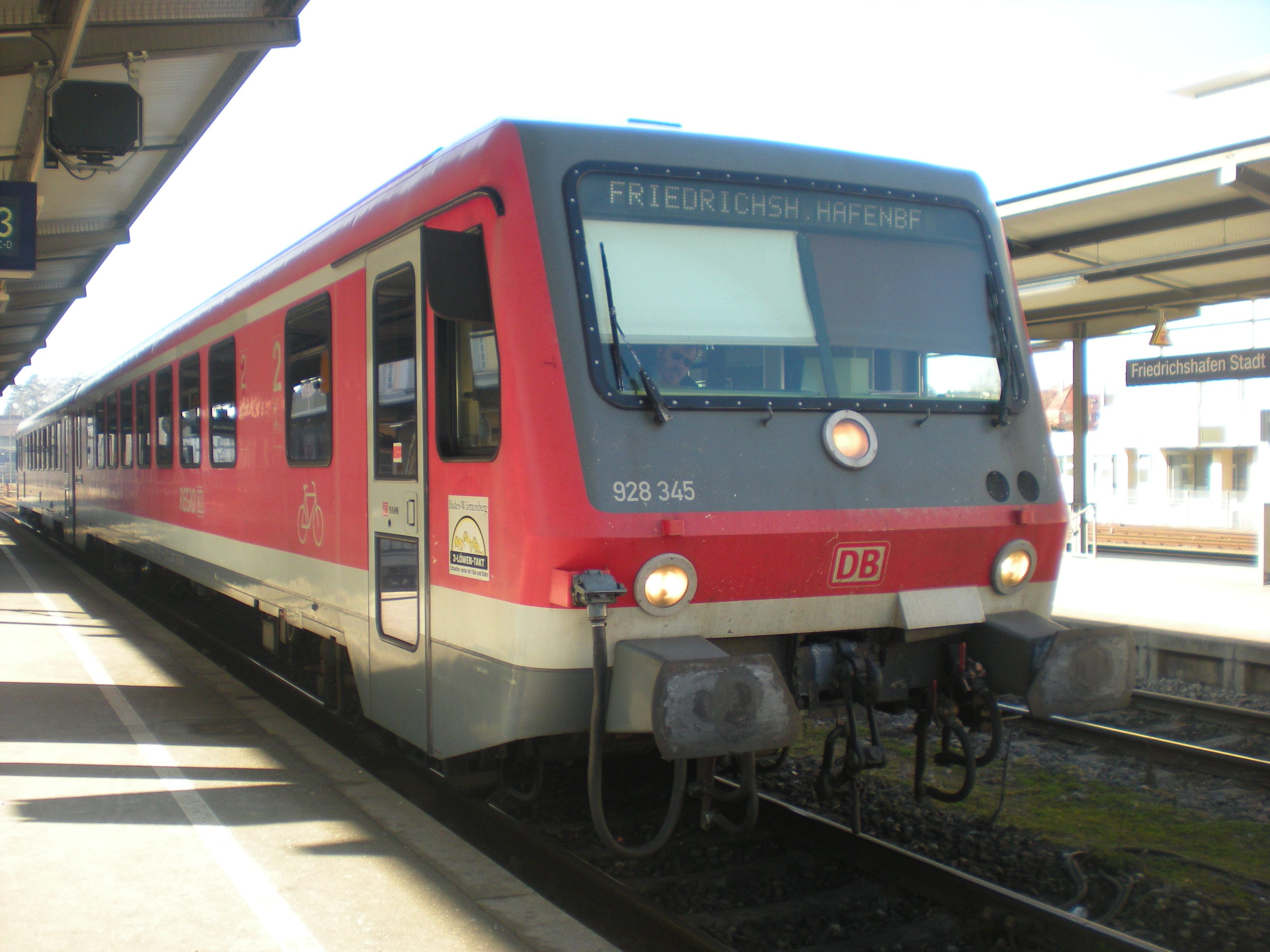 Triebwagen der Baureihe 628 als RB nach Friedrichshafen Hafen im Bahnhof Friedrichshafen Stadt